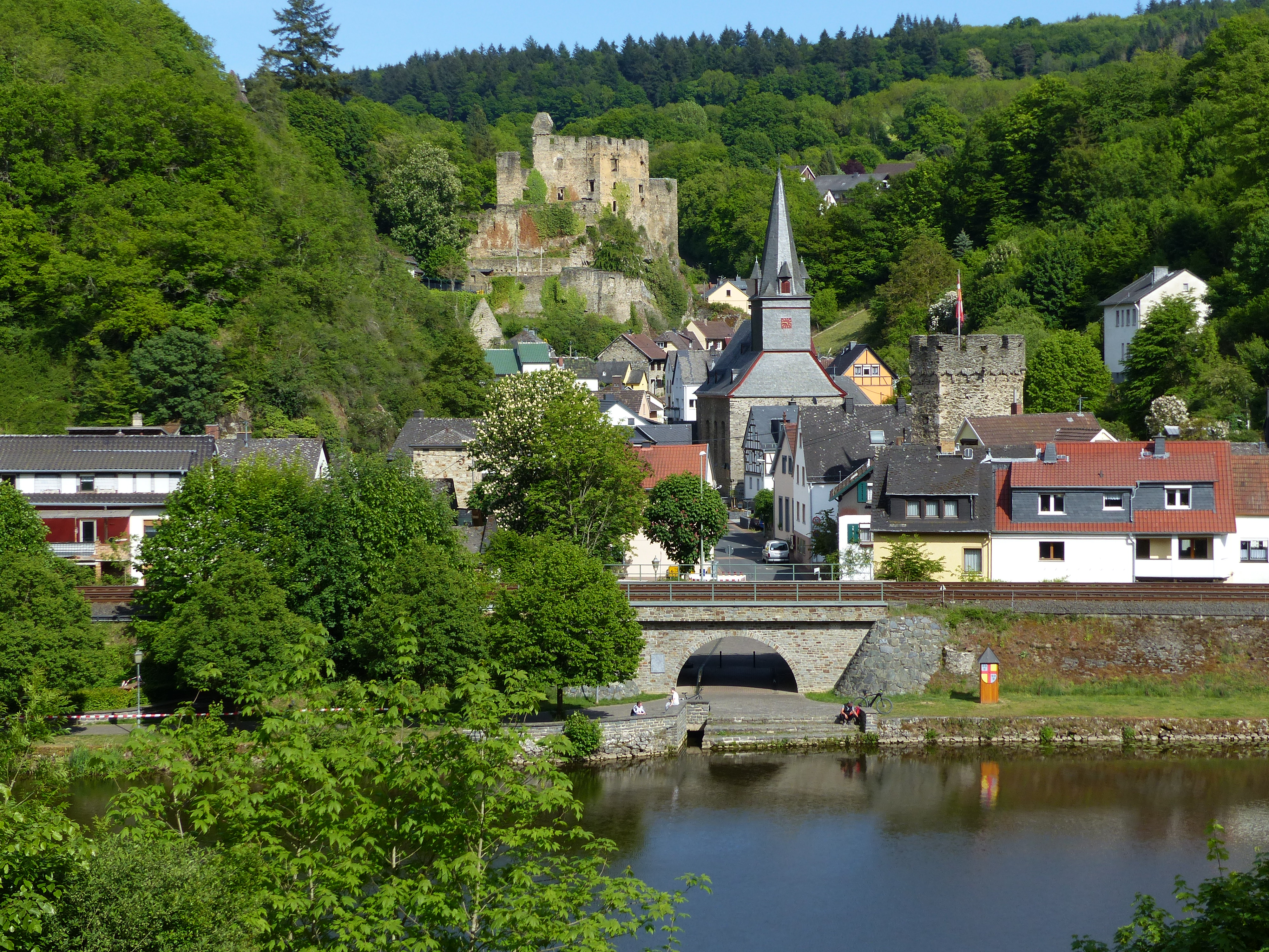 Balduinstein